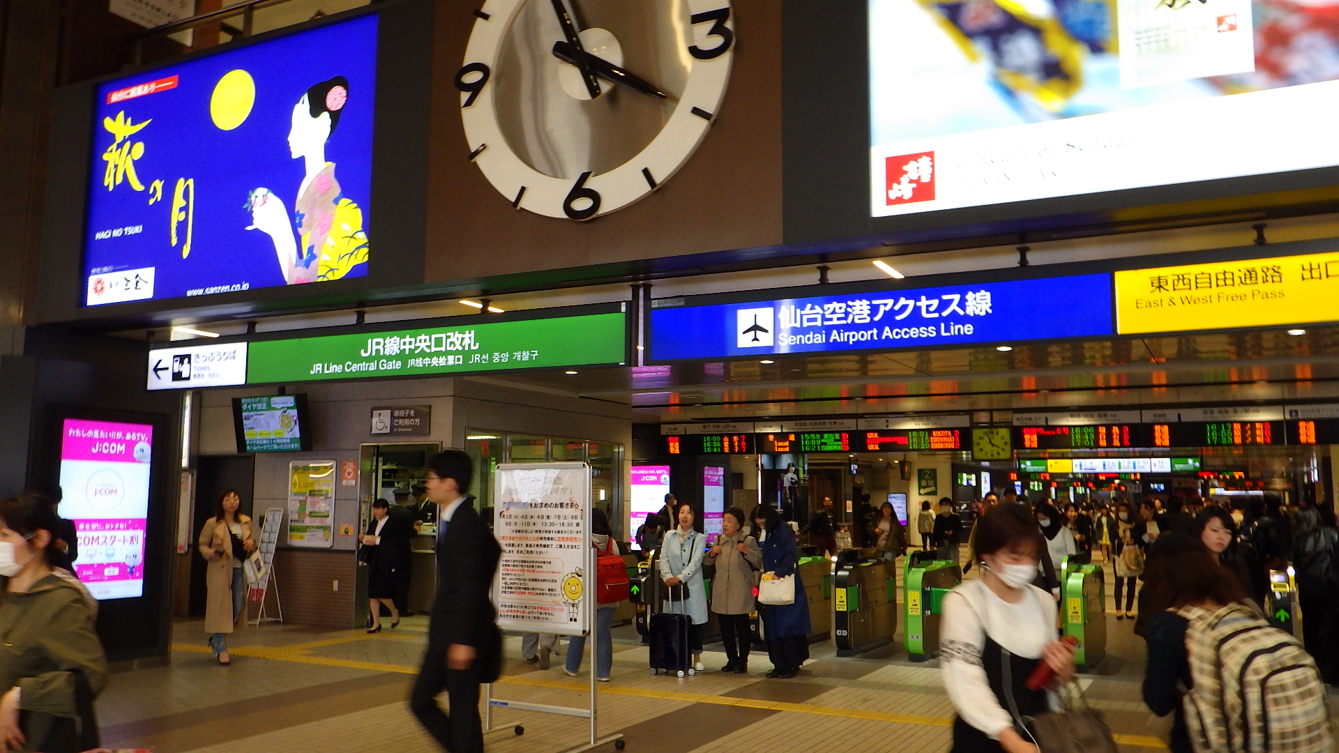 仙台駅中央改札